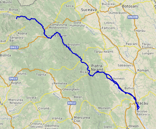 carte réalisée sur umap This map may be incomplete, and may contain errors. Don't rely solely on it for navigation.